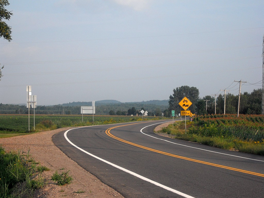 Vue sur la route 350, dans la municipalité de Saint-Boniface (région de la Mauricie), Québec, Canada. Cette route permet de relier la partie occidentale de MRC de Maskinongé au Centre-de-la-Mauricie.